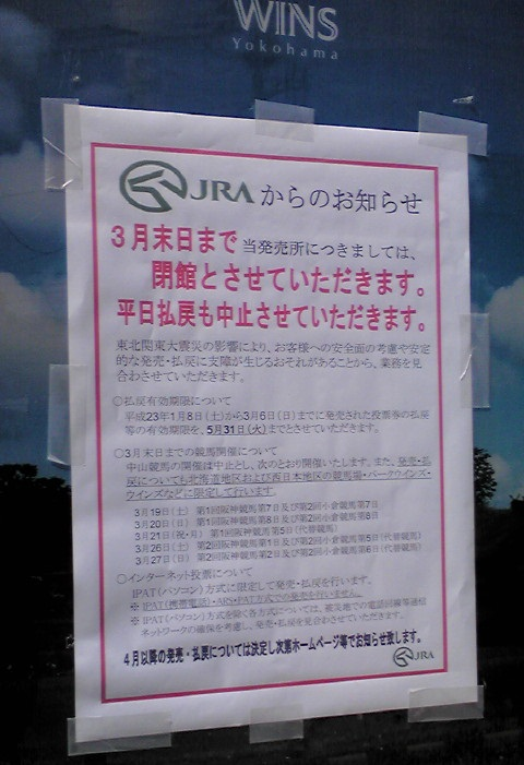 2011年3月17日にウインズ横浜にて撮影。 計画停電による閉館のお知らせのポスターです。